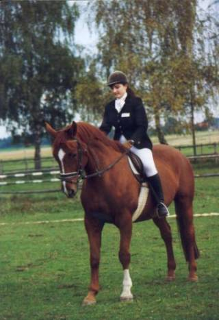 War mein Pflegepferd. Hochlader vermutlich Urheber